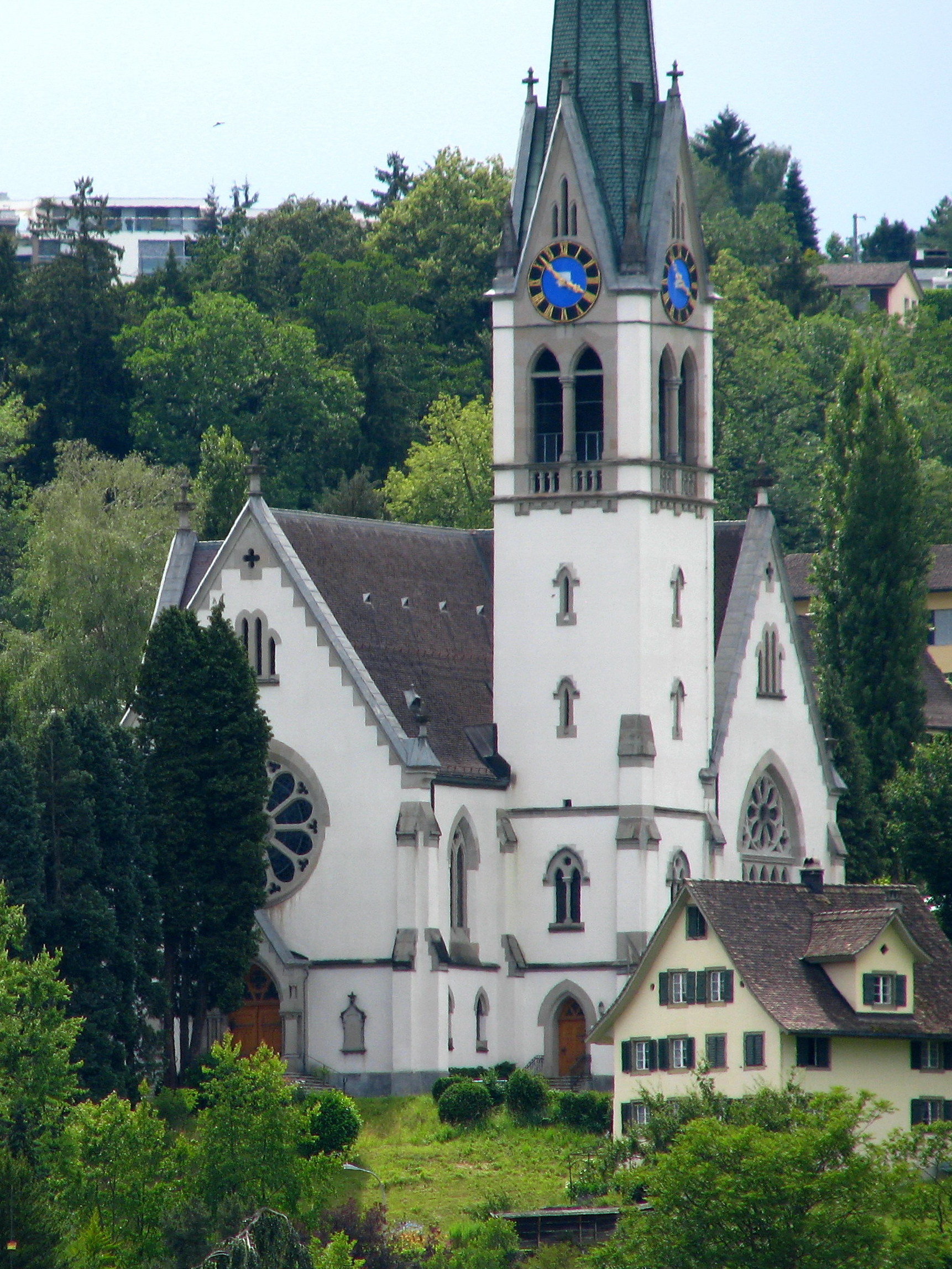 Reformierte Kirche Richterswil. Richterswil (ZH) (Switzerland) as seen from the Zürichsee.